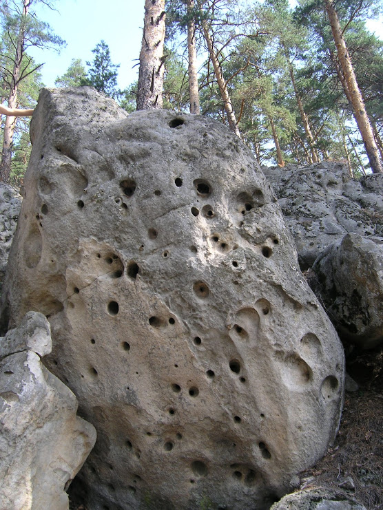 Валуны песчаника на территории памятника природы "Малоусинские нагорные сосняки и дубравы".